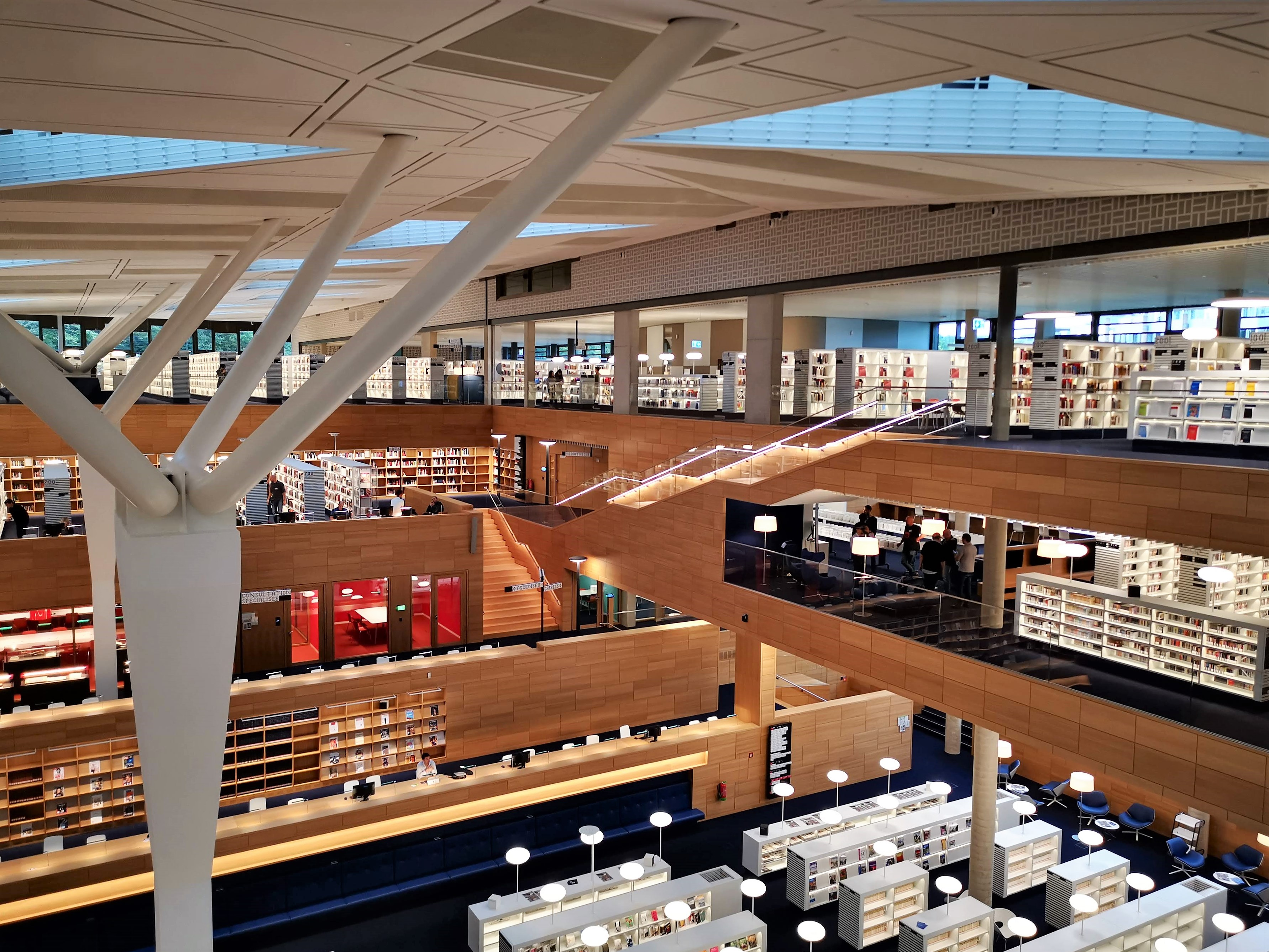 Luxembourg-Kirchberg, intérieur de la Bibliothèque nationale du Luxembourg.